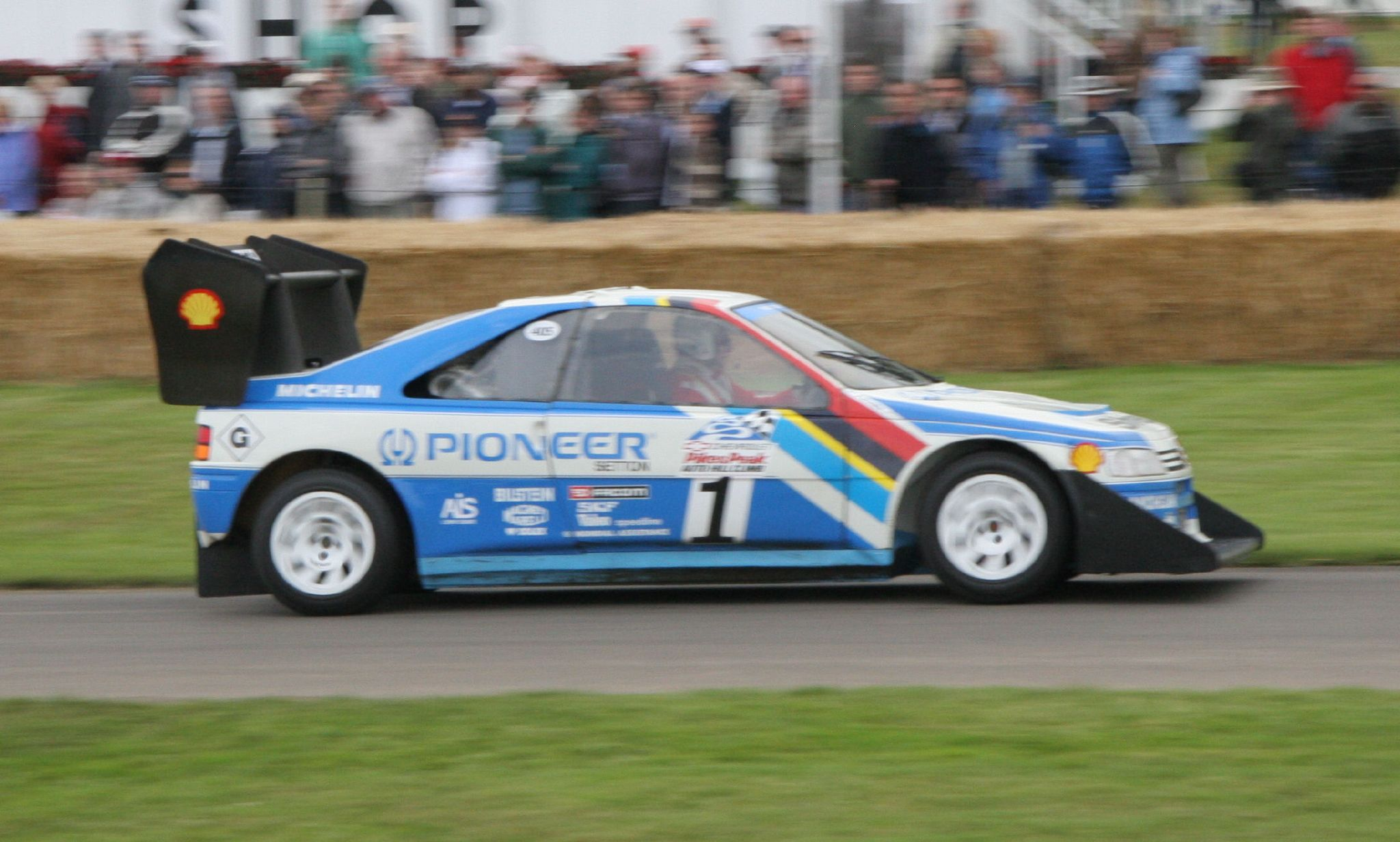 Peugeot 405T16GR 'Pikes Peak' 1988